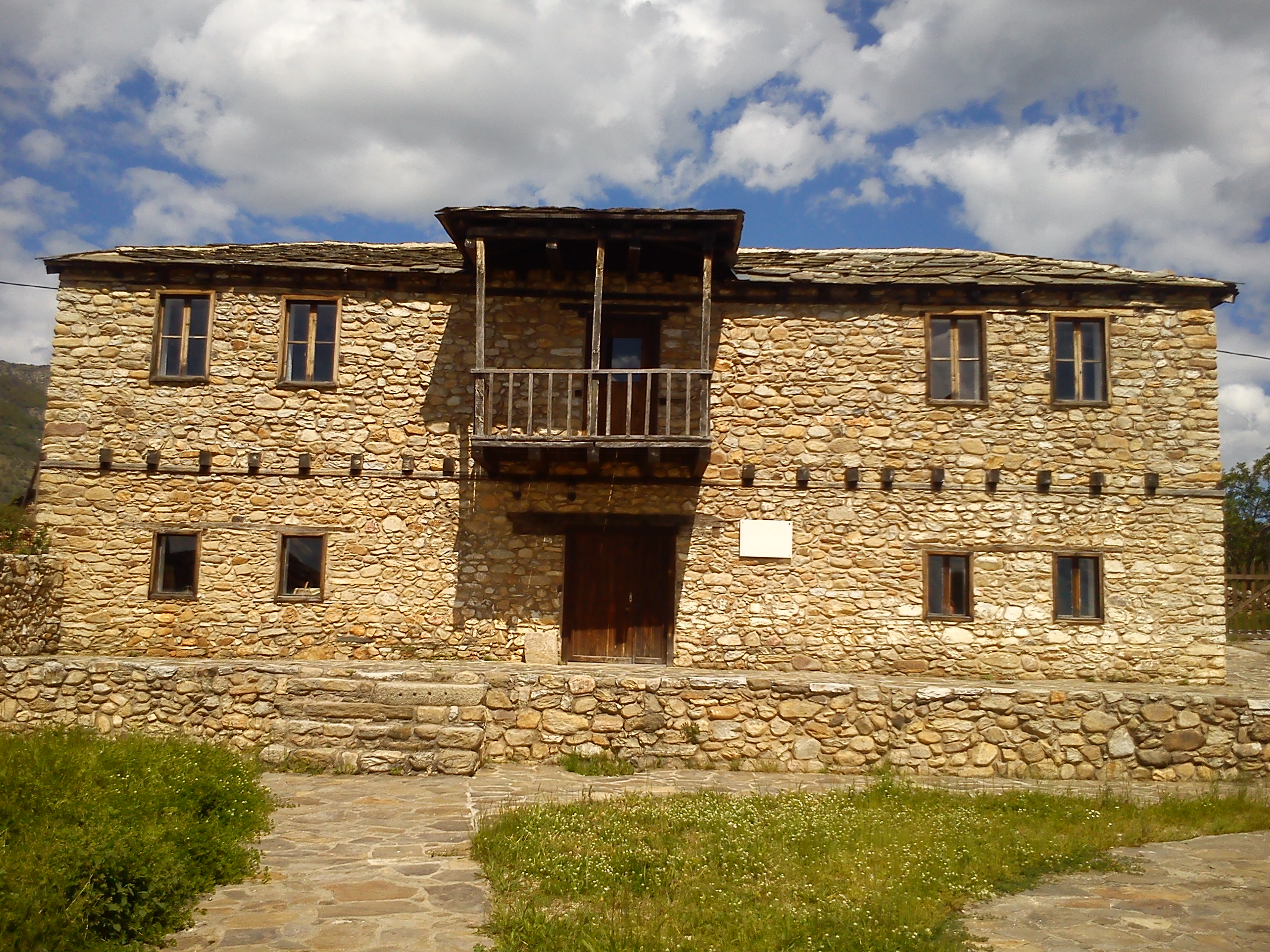 Куќата од Блаже Конески - с. Небрегово, Прилеп.